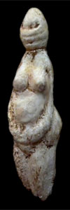 una foto del calco di una venere di parabita